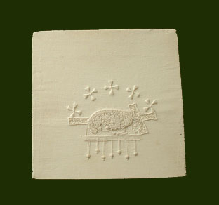 zelf gemaakt